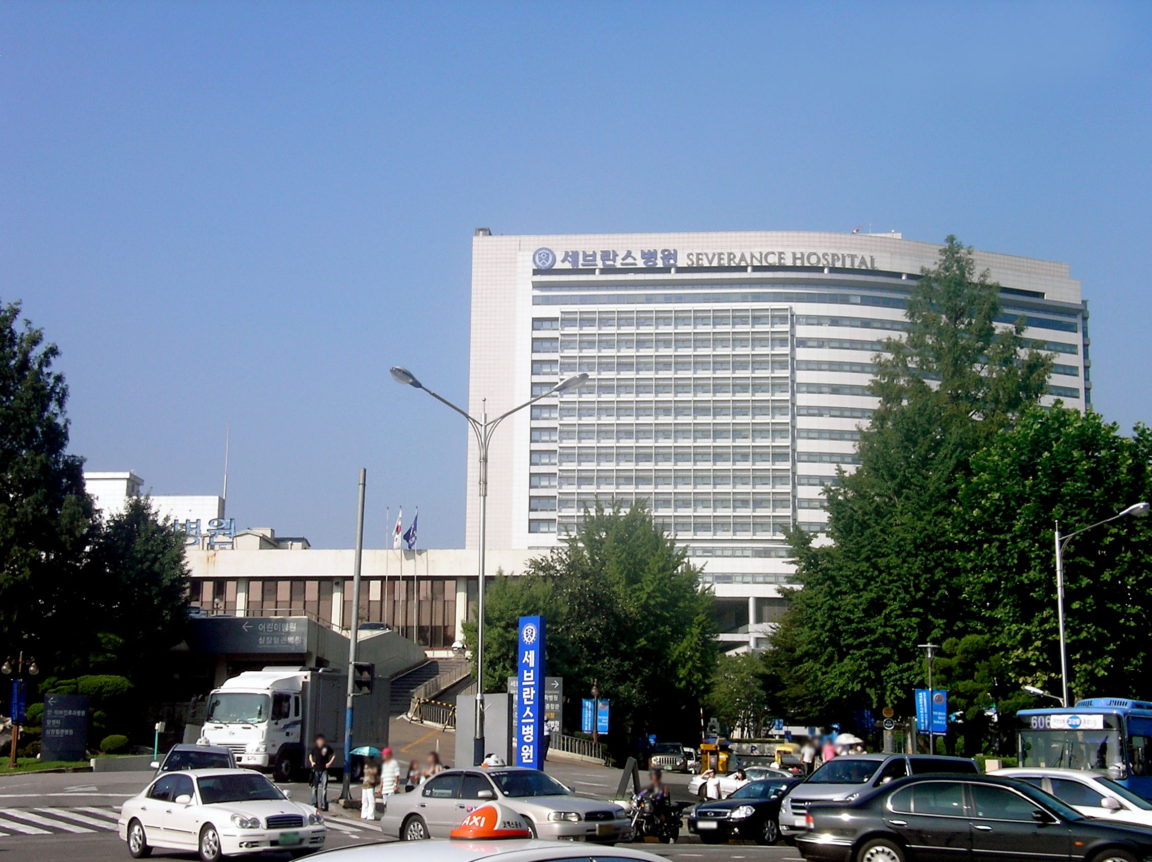 Severance Hospital